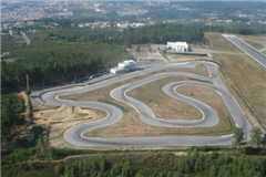 Foto aérea do traçado do Kartódromo AMF Vila Real